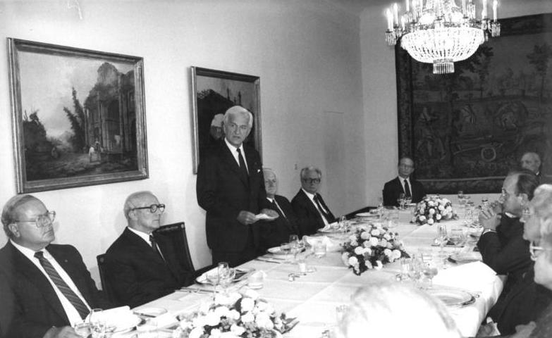 ADN-ZB Mittelstädt-7.9.87-kb-BRD: Honecker-Besuch-Toast des Bundespräsidenten der Bundesrepublik Deutschland, Richard von Weizsäcker, auf einem Essen zu Ehren von Erich Honecker, Generalsekretär des ZK der SED und Vorsitzender des Staatsrates der DDR, in der Bonner Villa Hammerschmidt, l.: Martin Bangemann, (4.v.l.), Günter Mittag, Hans-Jochen Vogel (5.v.l.), Hans Otto Bräutigam (6.v.l.)